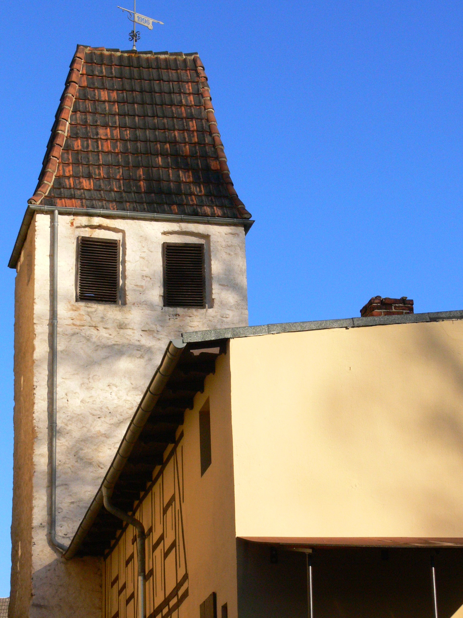 Hussitenturm, Wachturm mit Wetterfahne an der ehemaligen Stadtmauer in Altenburg